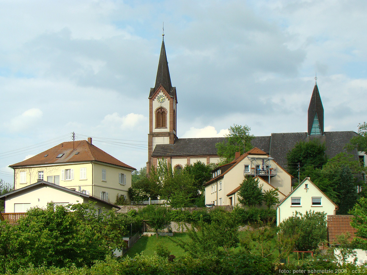 Katholische Kirche und Pfarrhaus (links) in Neckargerach